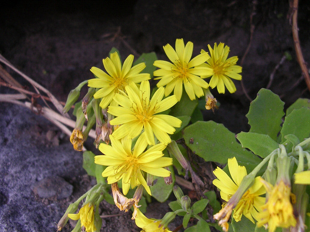 アゼトウナ（静岡県伊東市)Crepidiastrum keiskeanum (Ito-city, Shizuoka, JAPAN)